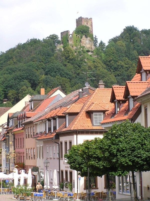 Waldkirch am Fuße der Kastelburg